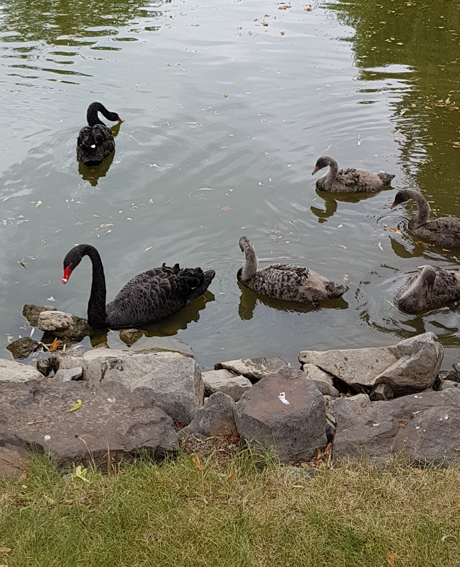 Trauerschwäne mit Jungen in der Rosenau bei Coburg in Bayern